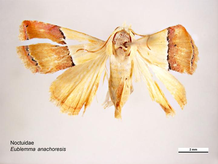 Eublemma anachoresis dorsal view